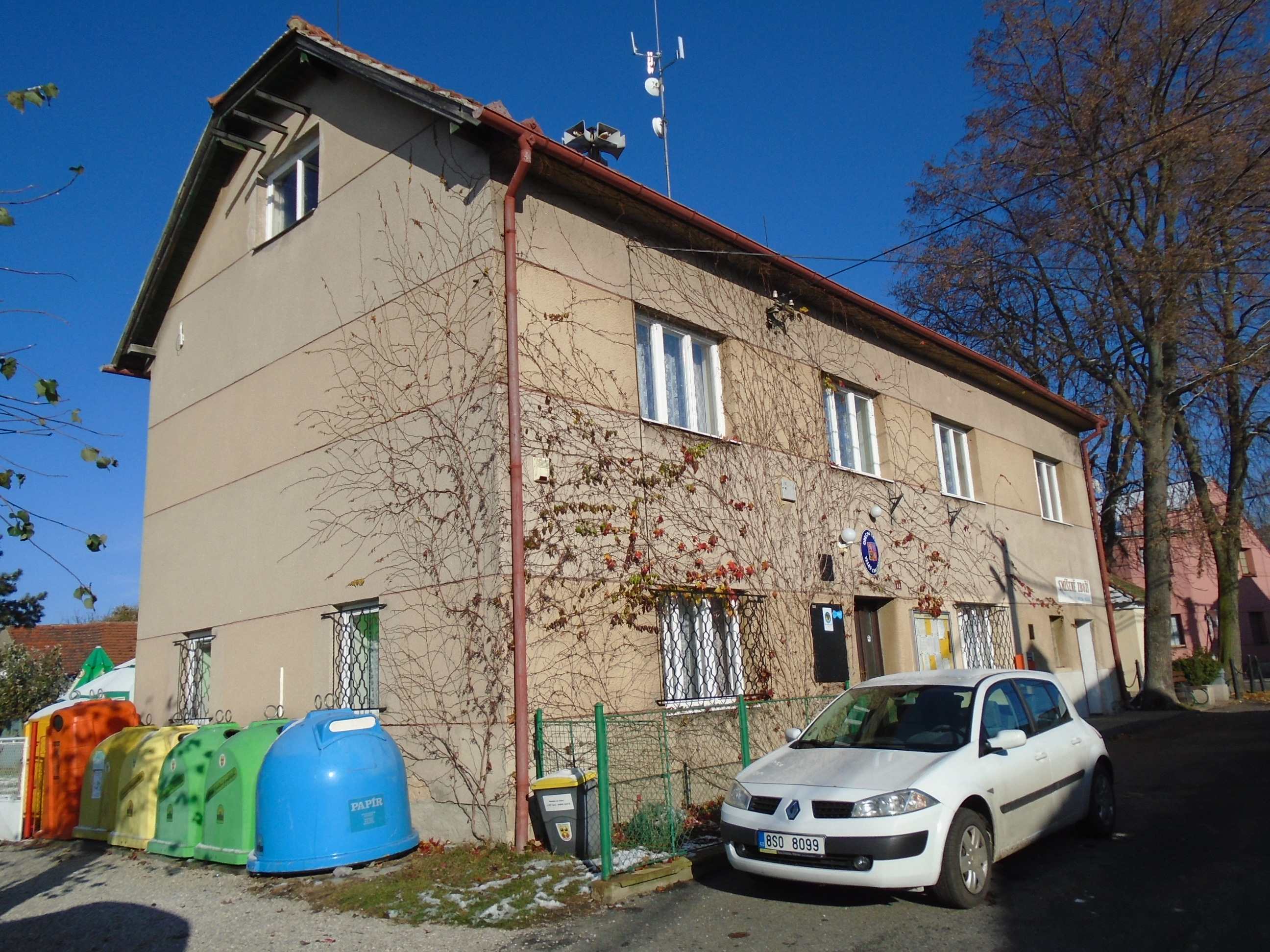 Obecní úřad a stanoviště kontejnerů na návsi